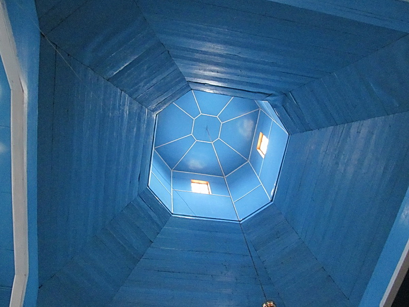 Залужжа. Царква Святога Георгія